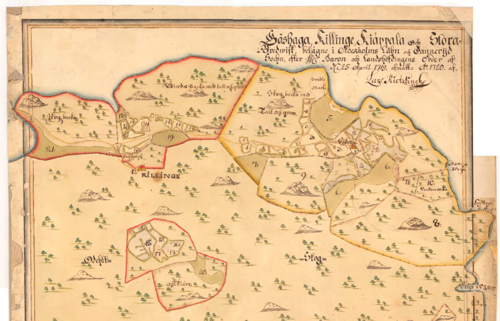 Fastighetskarta över Gåshaga och Killinge, Lidingö, upprättat 1720 efter en ägodelning mellan gårdar. Kartan 1720 över Lidingös alla gårdar togs fram på uppdrag av Johan Claesson Banér (1659-1736) på Djursholms slott och landshövdingen i Stockholm län.